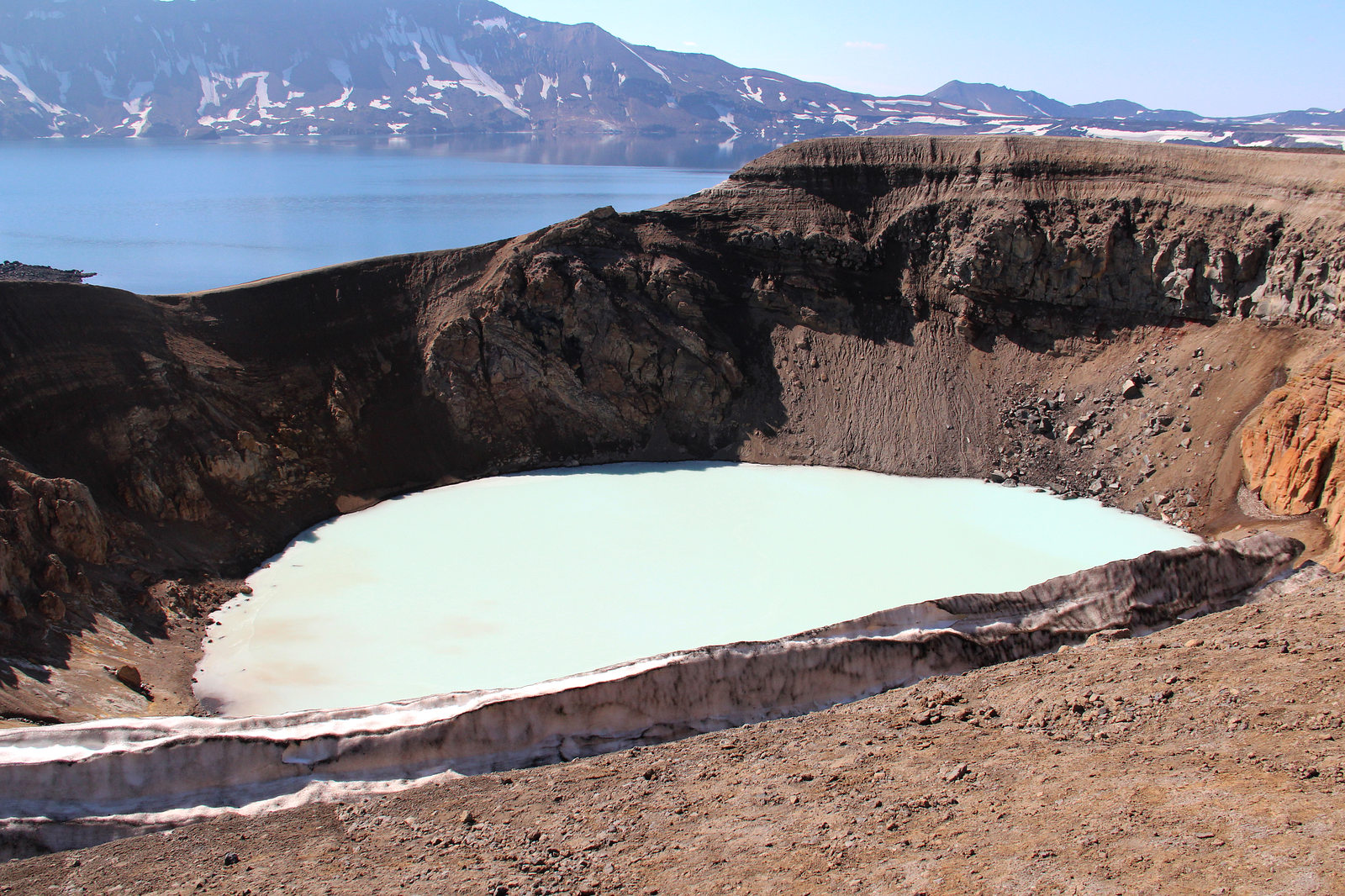 Víti med Öskjuvatn i baggrunden